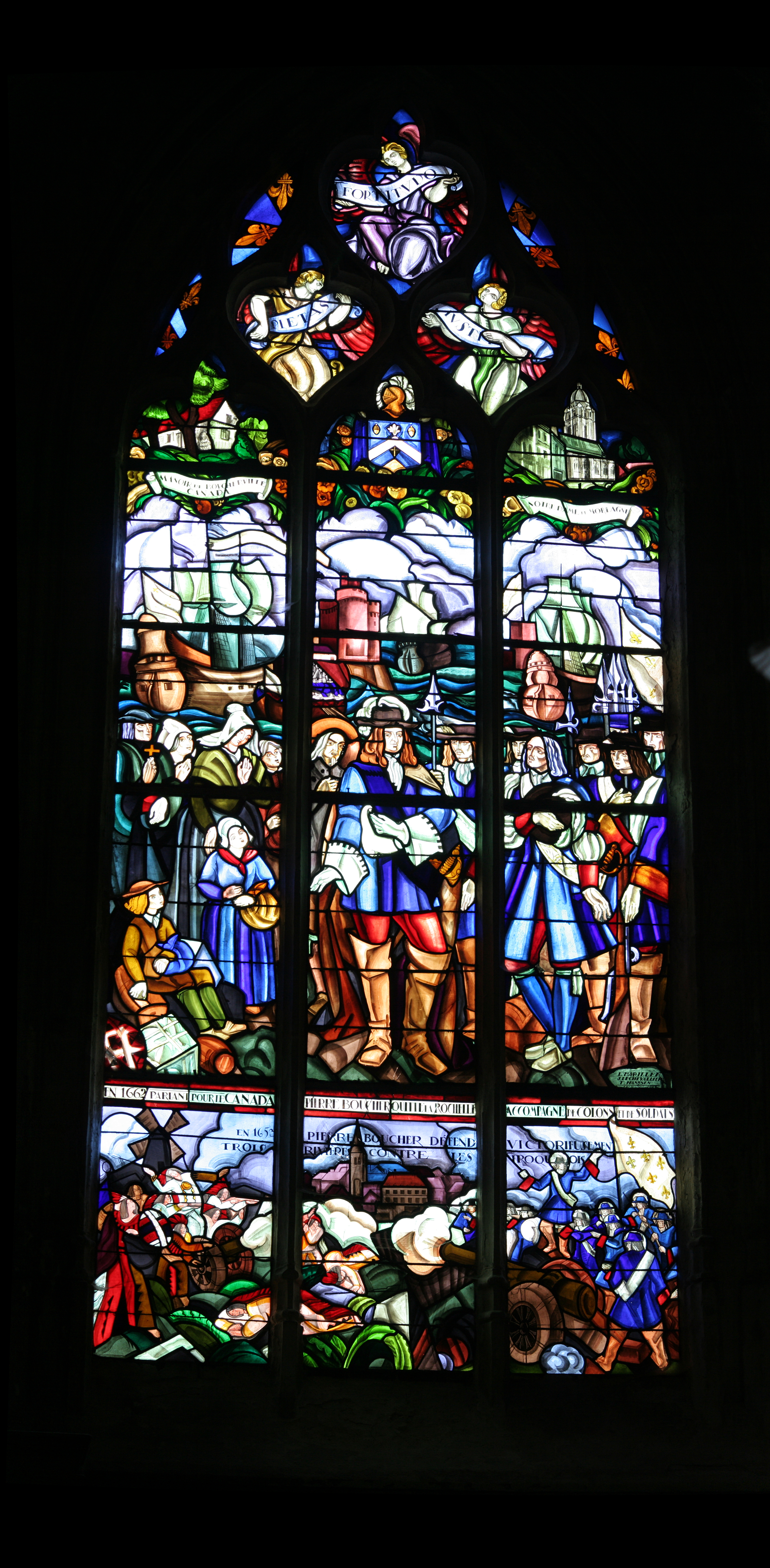 Vitrail dans l'église Notre-Dame de Mortagne-au-Perche; signature: L. BARILLET J. LECHEVALLIER T. HANSSEN...